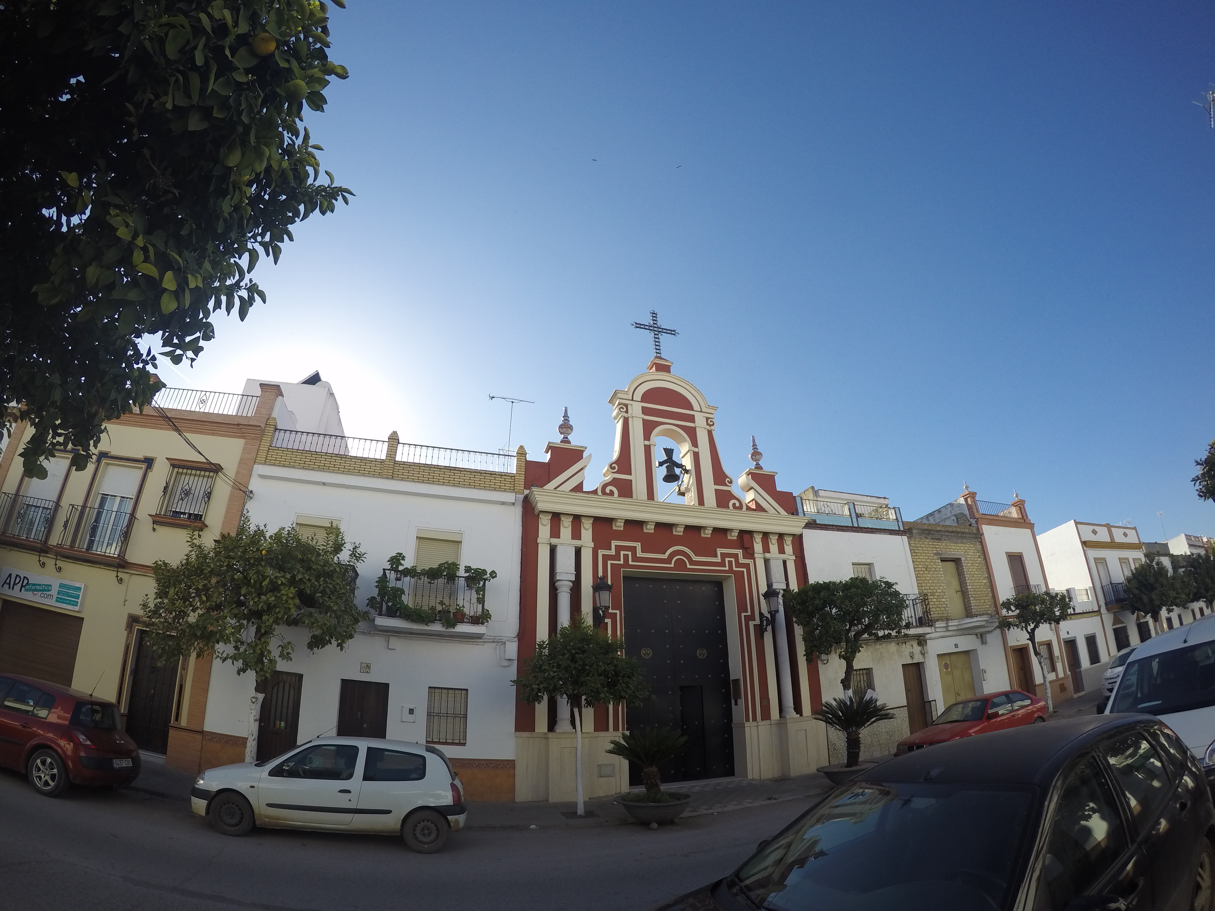 Capilla de la Hermandad Servita ubicada en la Calle Abajo. El Viernes Santo por la tarde salen procesiones de ella.